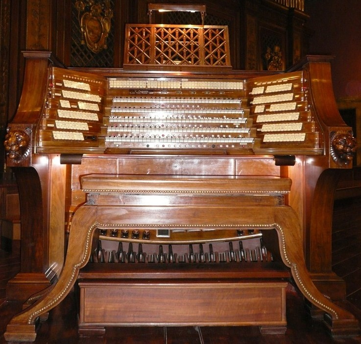 PIMS consolle Mascioni 5